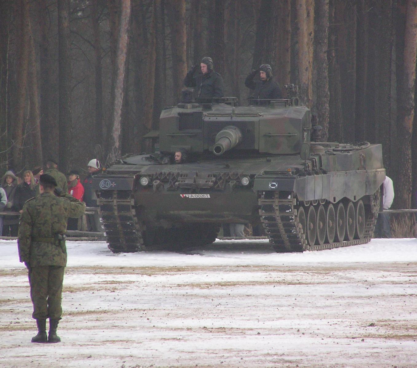 Panzer Leopard 2A4 der 10. gepanzerten polnischen Kavalerie-Brigade in Neuhammer/Świętoszów.